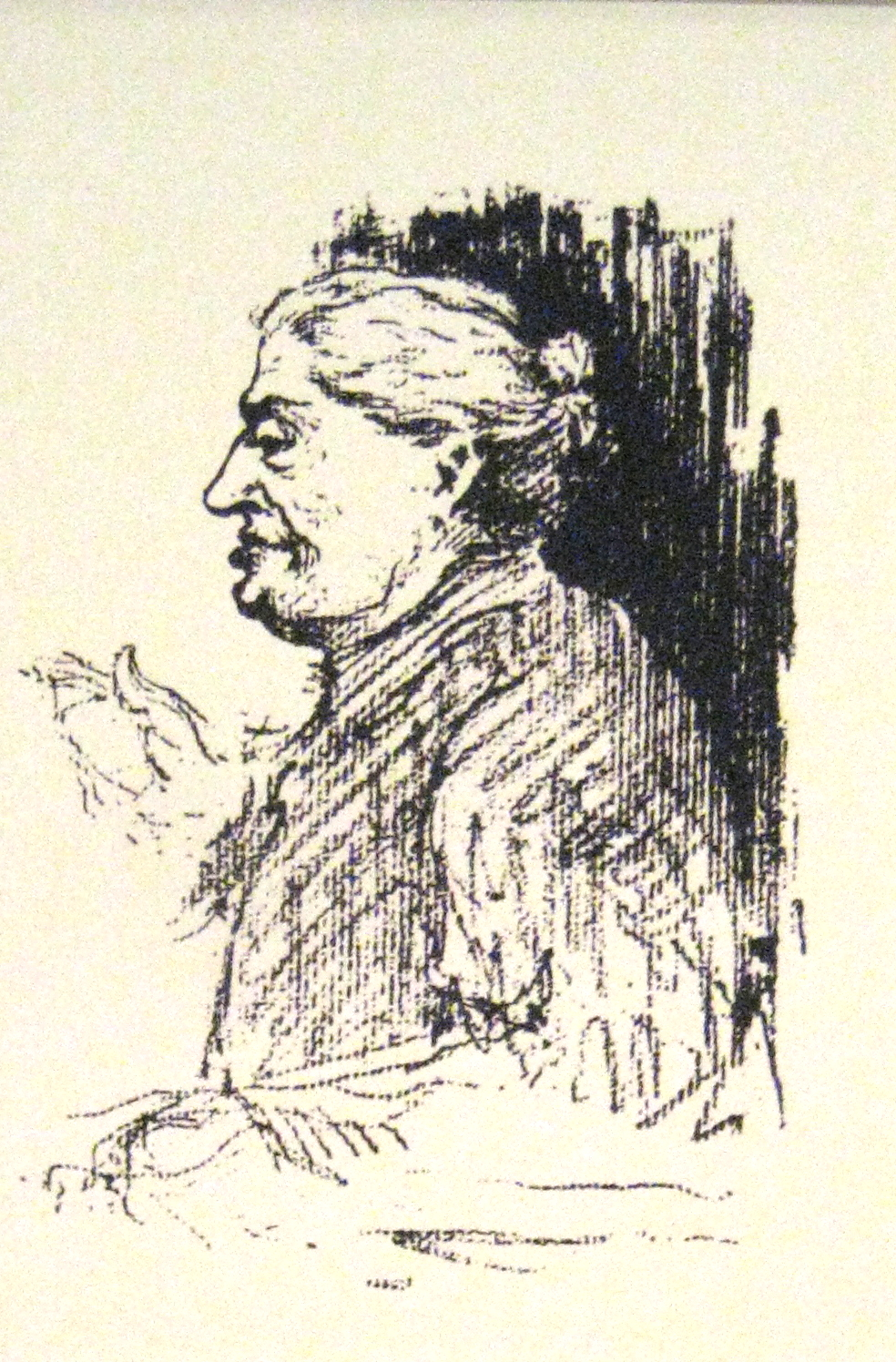 Ю.К. Арцыбушев. Портреты политических деятелей. Москва, 14 августа 1917. ГИМ. Зарисовки с натуры, выполненные во время Государственного совещания в Москве, были опубликованы в издательстве Д.Я. Маковского